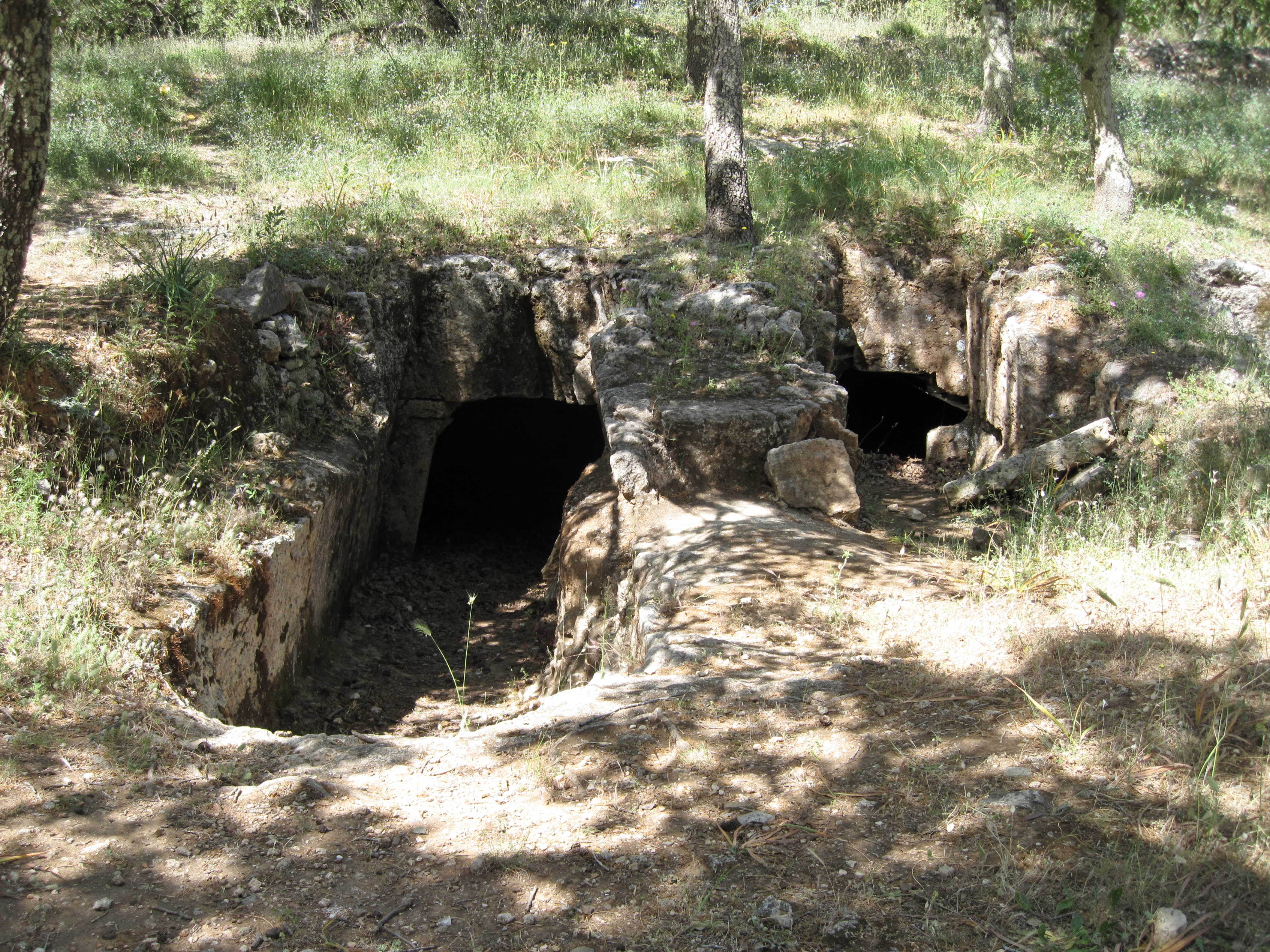 Grabanlage auf dem spätminoischen Friedhof von Armeni, Präfektur Rethymno, Kreta, Griechenland